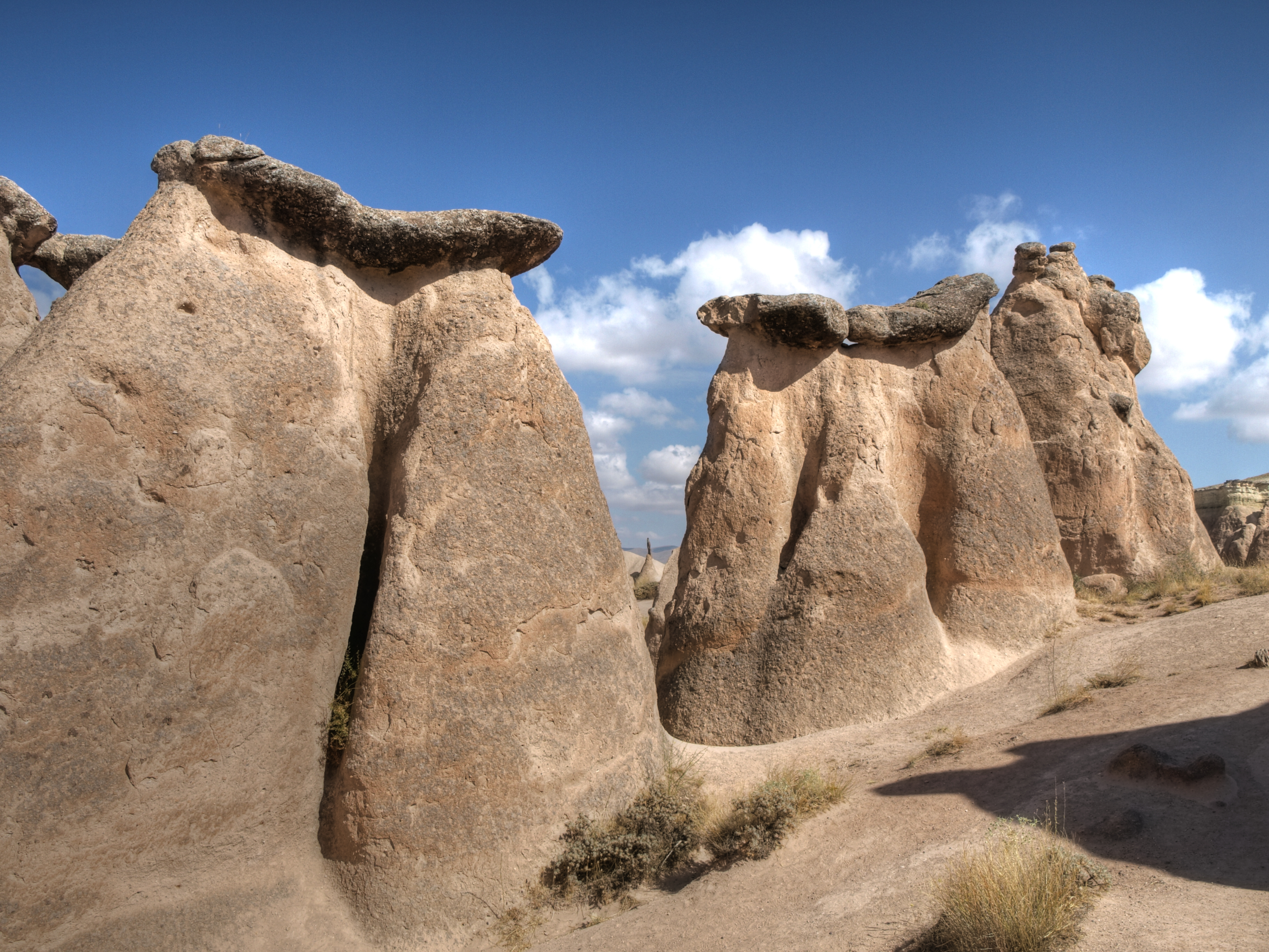 Camini delle fate